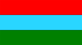 прапор Зимнівської сільської об’єднаної територіальної громади